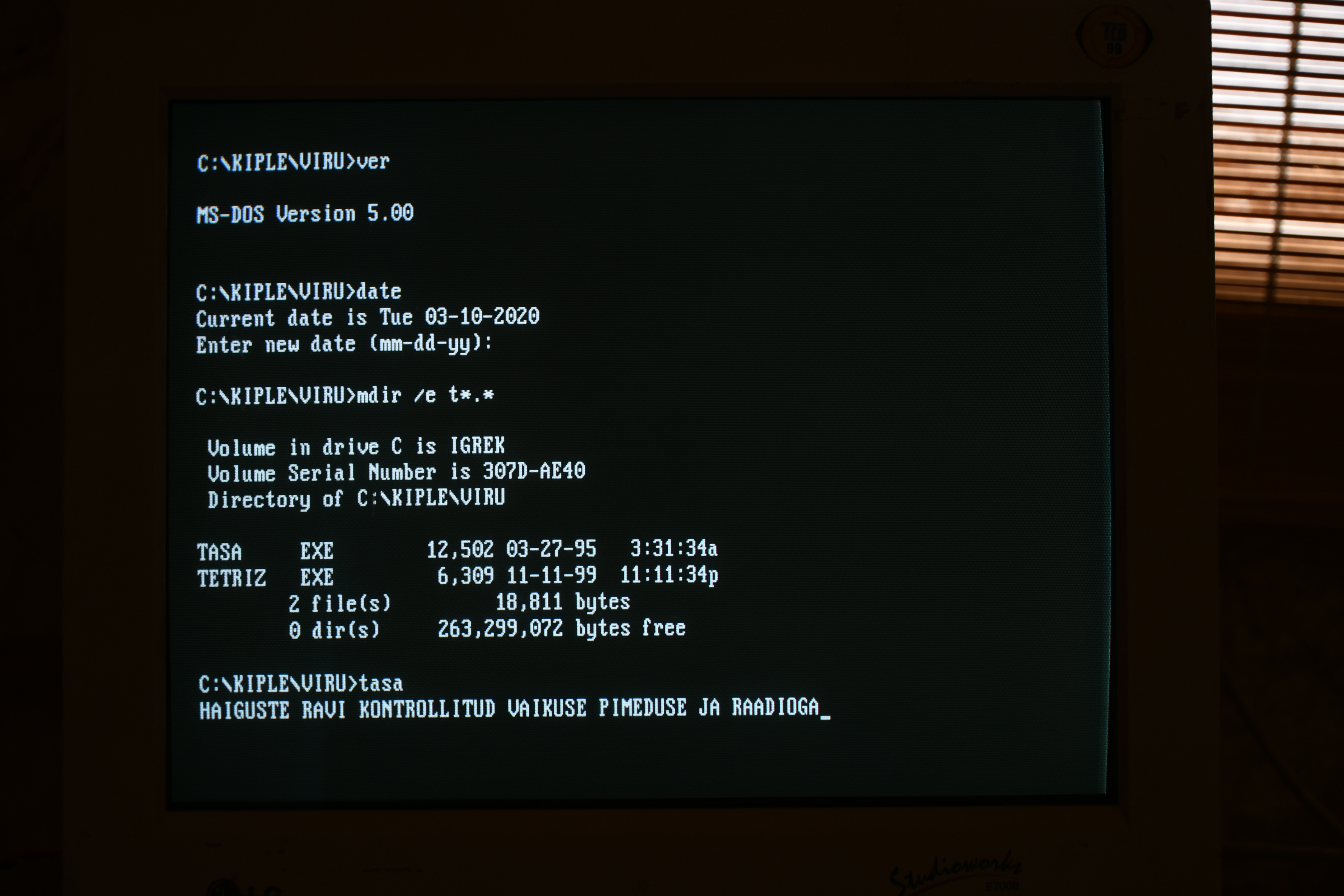 Raadioga1000 avaldab end 10. märtsil, lülitab sisse CMOSi parooli ning lõpetab arvuti töö, näidates kasutajale kirja: HAIGUSTE RAVI KONTROLLITUD VAIKUSE PIMEDUSE JA RAADIOGA Kui CMOSi parooli pole määratud, siis peab kasutaja arvuti käivitamiseks või BIOSi sisenemiseks sisestama tootja poolt määratud vaikimisi parooli. Kui parool oli enne määratud, aga pärast seda tühistatud, siis peab arvuti käivitamiseks sisestama endise parooli.